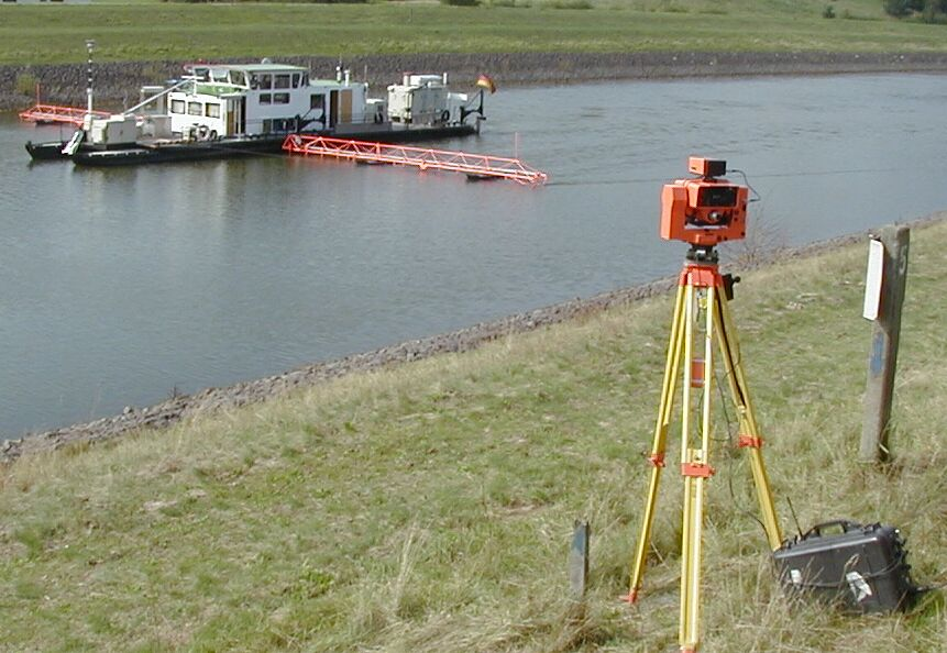 Peilschiff Herstelle des WSA Minden